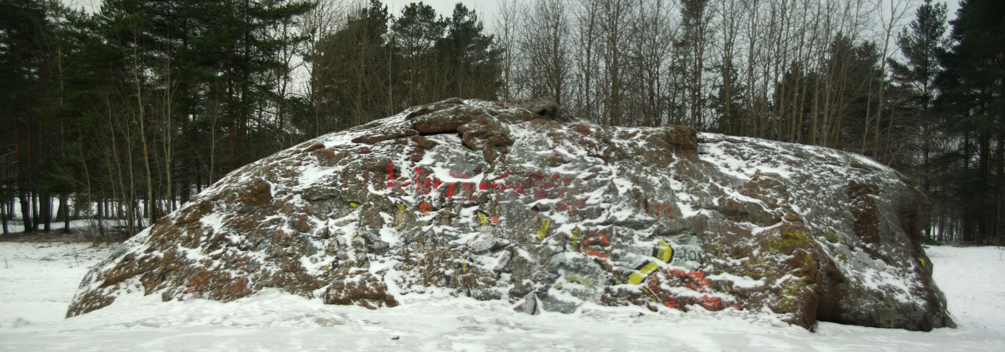 asub Tallinnas Järvel raudtee ääres